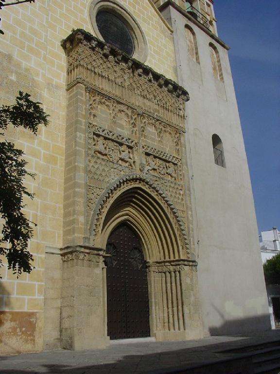 Portada occidental de la Parroquia de Ntra. Sra. de la O, Sanlúcar de Barrameda(España)